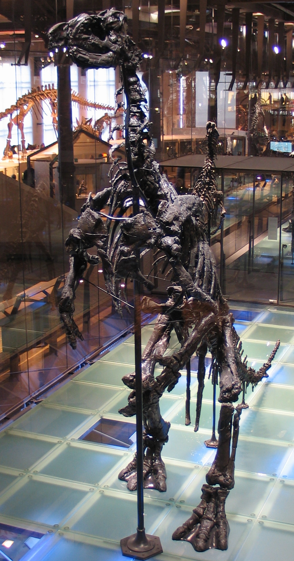 Iguanodon Bernissartensis at the Museum voor Natuurwetenschappen in Brussels, Belgium